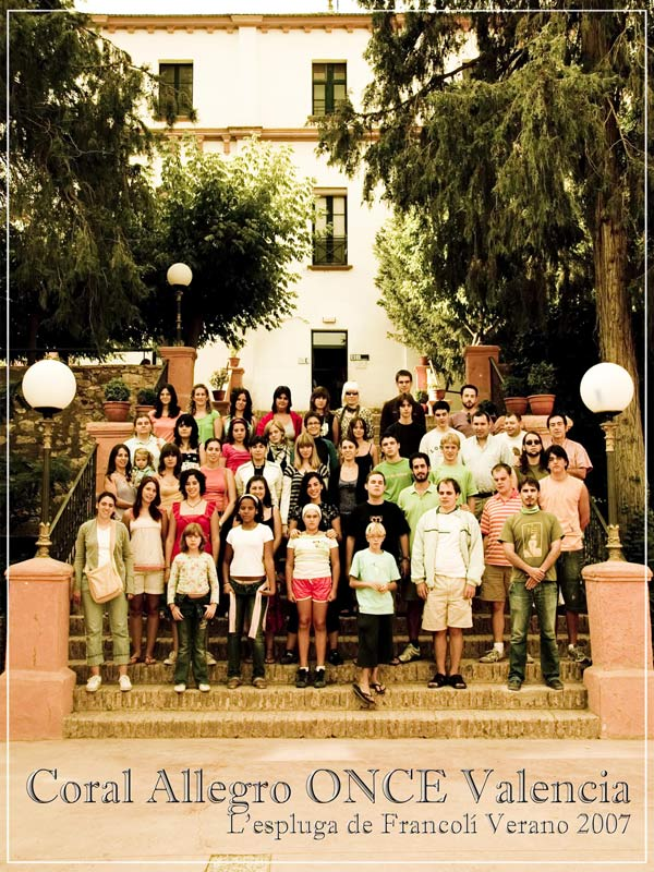 La Coral Allegro ONCE Valencia en el plan de formación de l'Espluga de Francolí (Tarragona) en el año 2007.